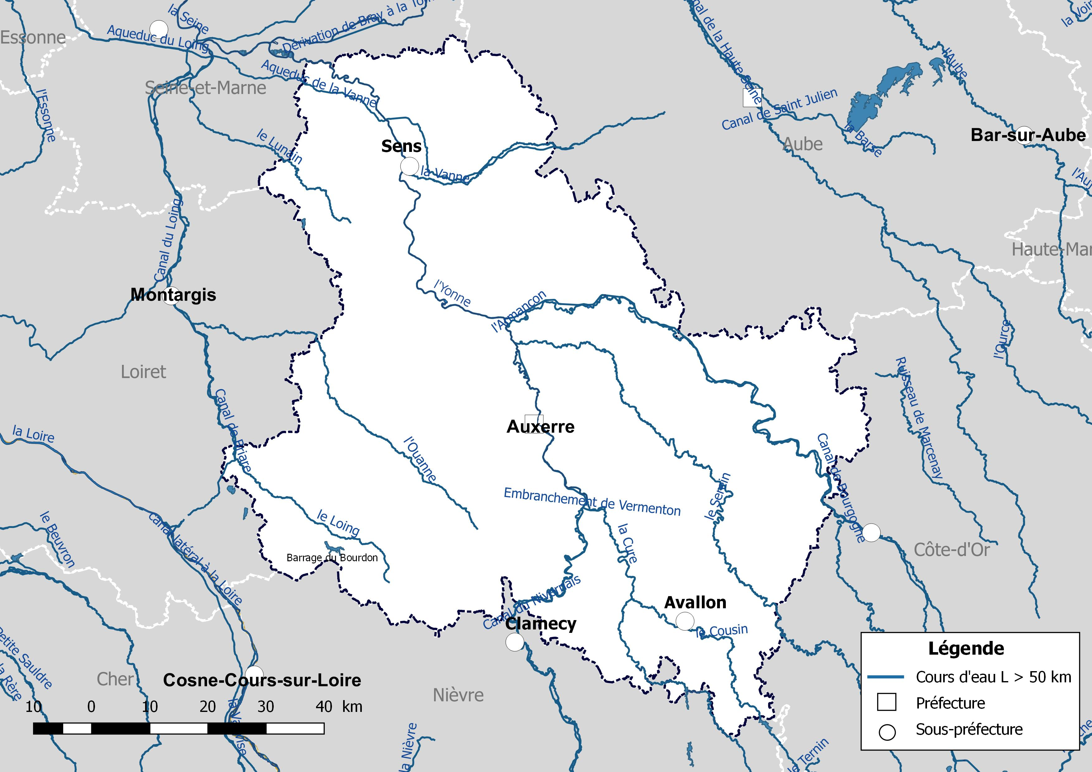 Carte des cours d'eau de longueur supérieure à 50 km drainant le département d l'Yonne (France).